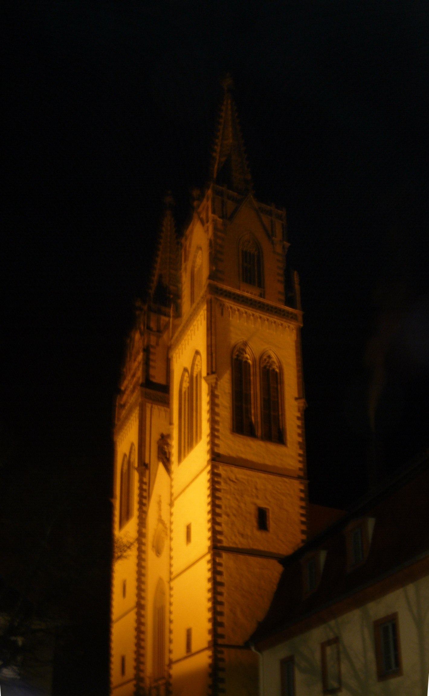 St.-Aegidien-Kirche in Oschatz bei Nacht